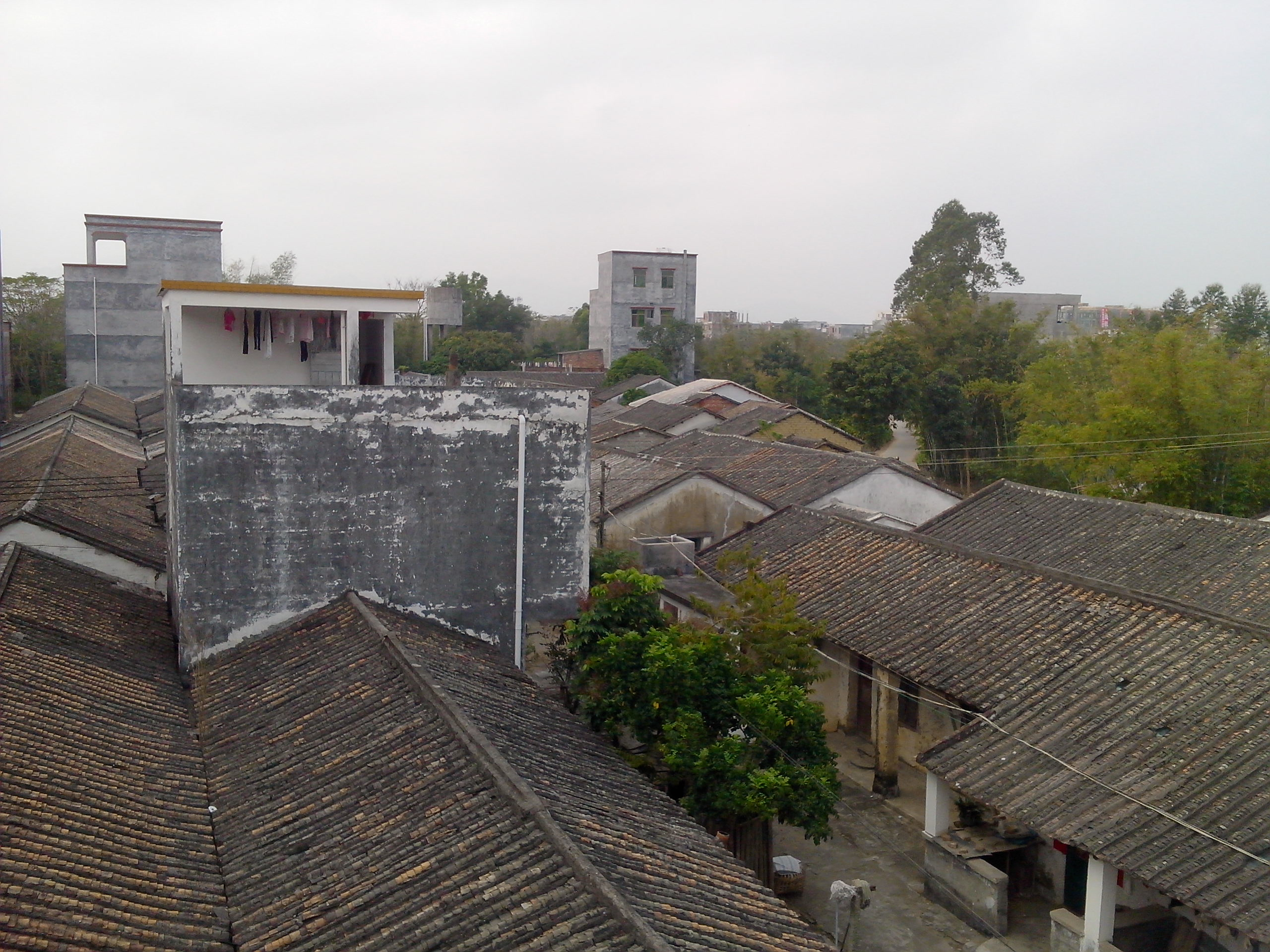 2015年摄于阳春市。